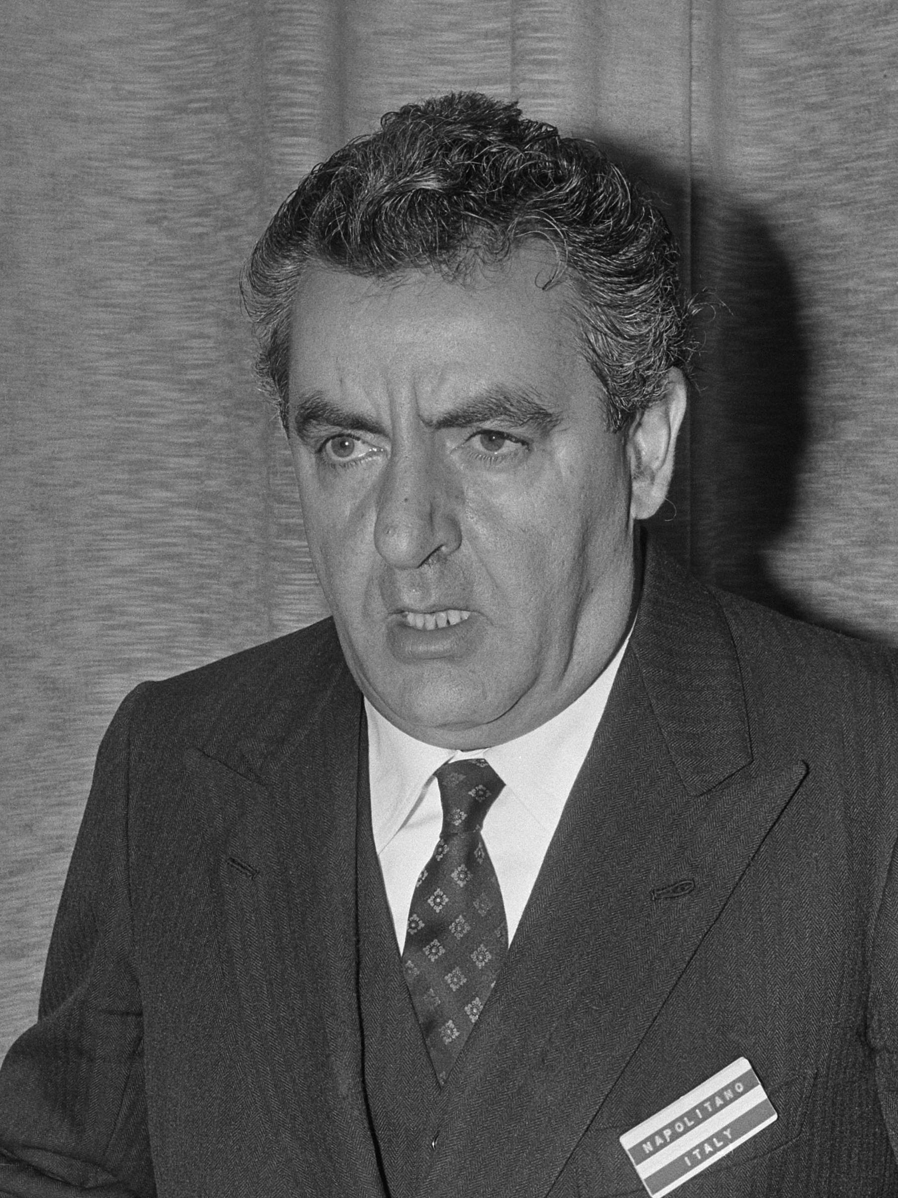 Prins Bernhard opent 25e Int. Ruimtevaart Congres in RAI in Amsterdam 30 september 1974